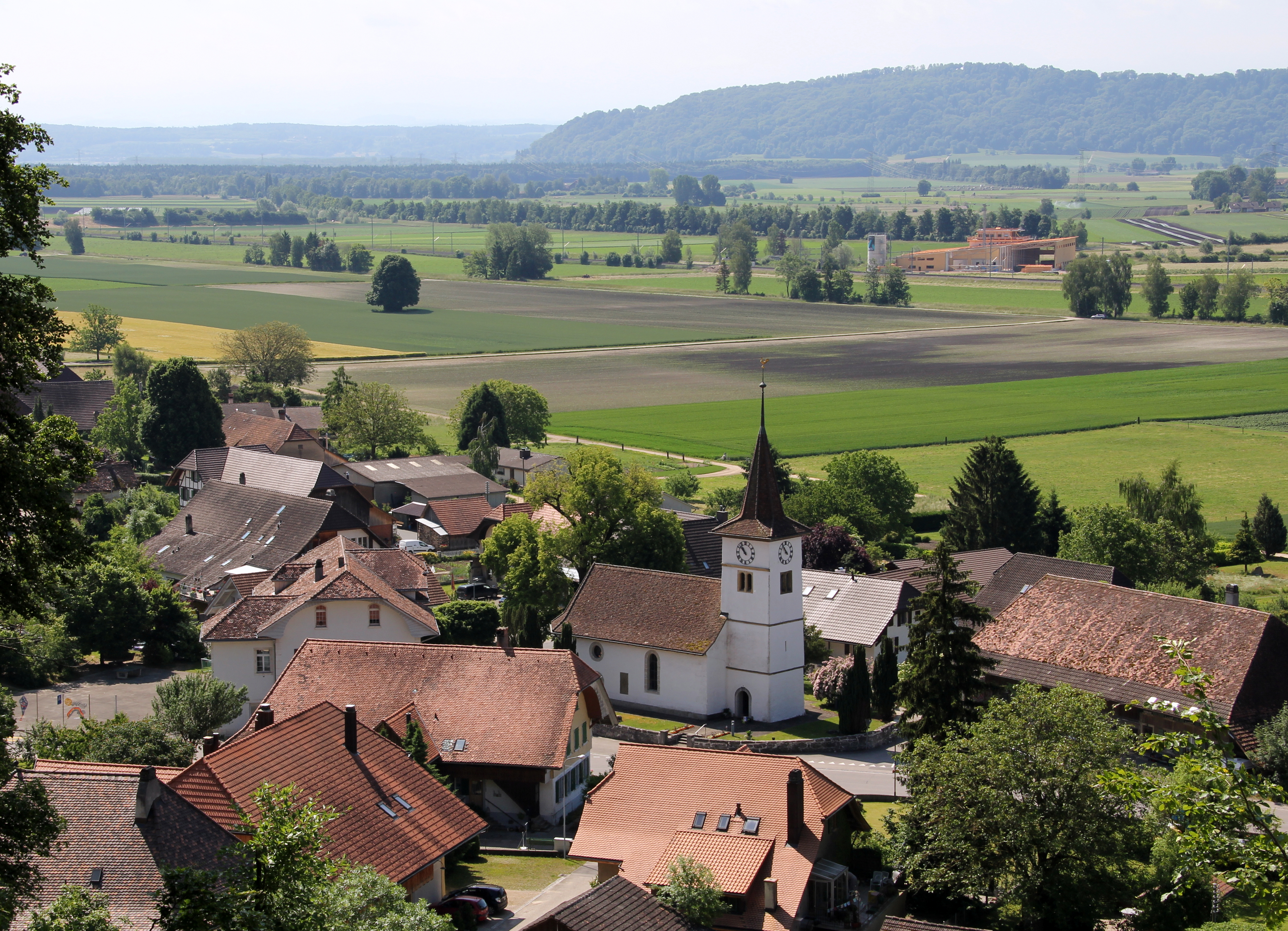 Frühmittelalterliche Kirche, Patrozinium St. Martin